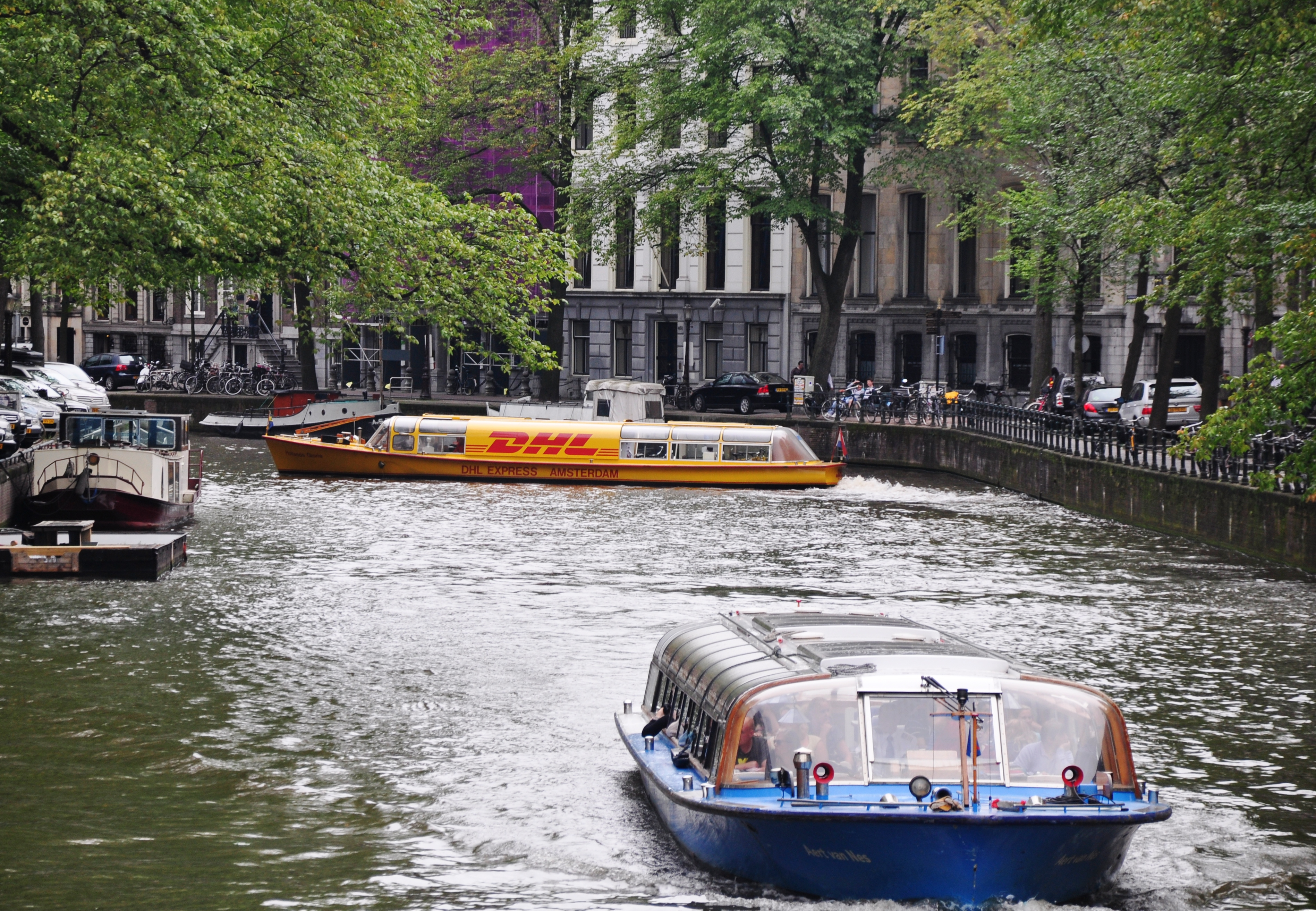 Holland, Amsterdam, DHL